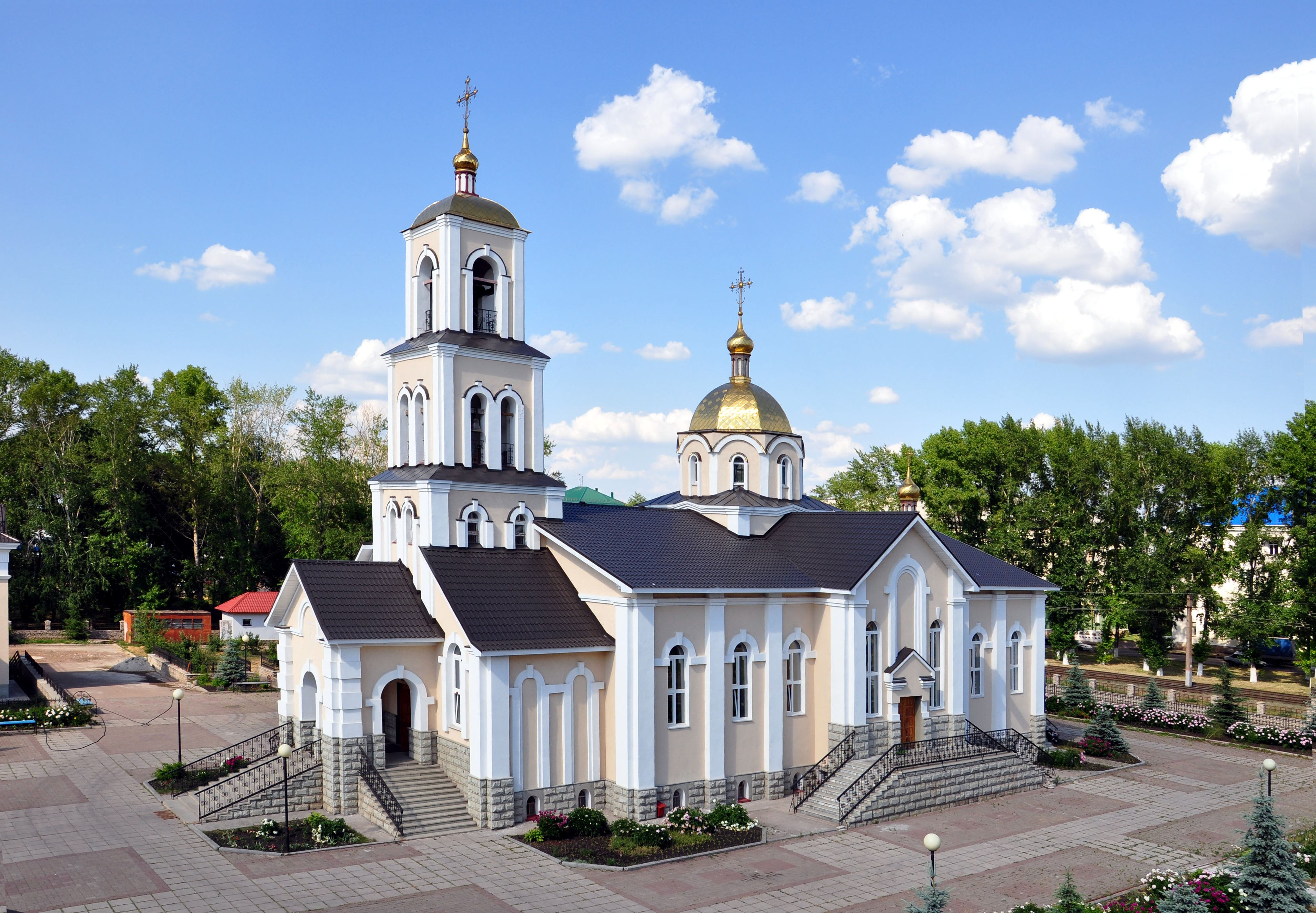 church